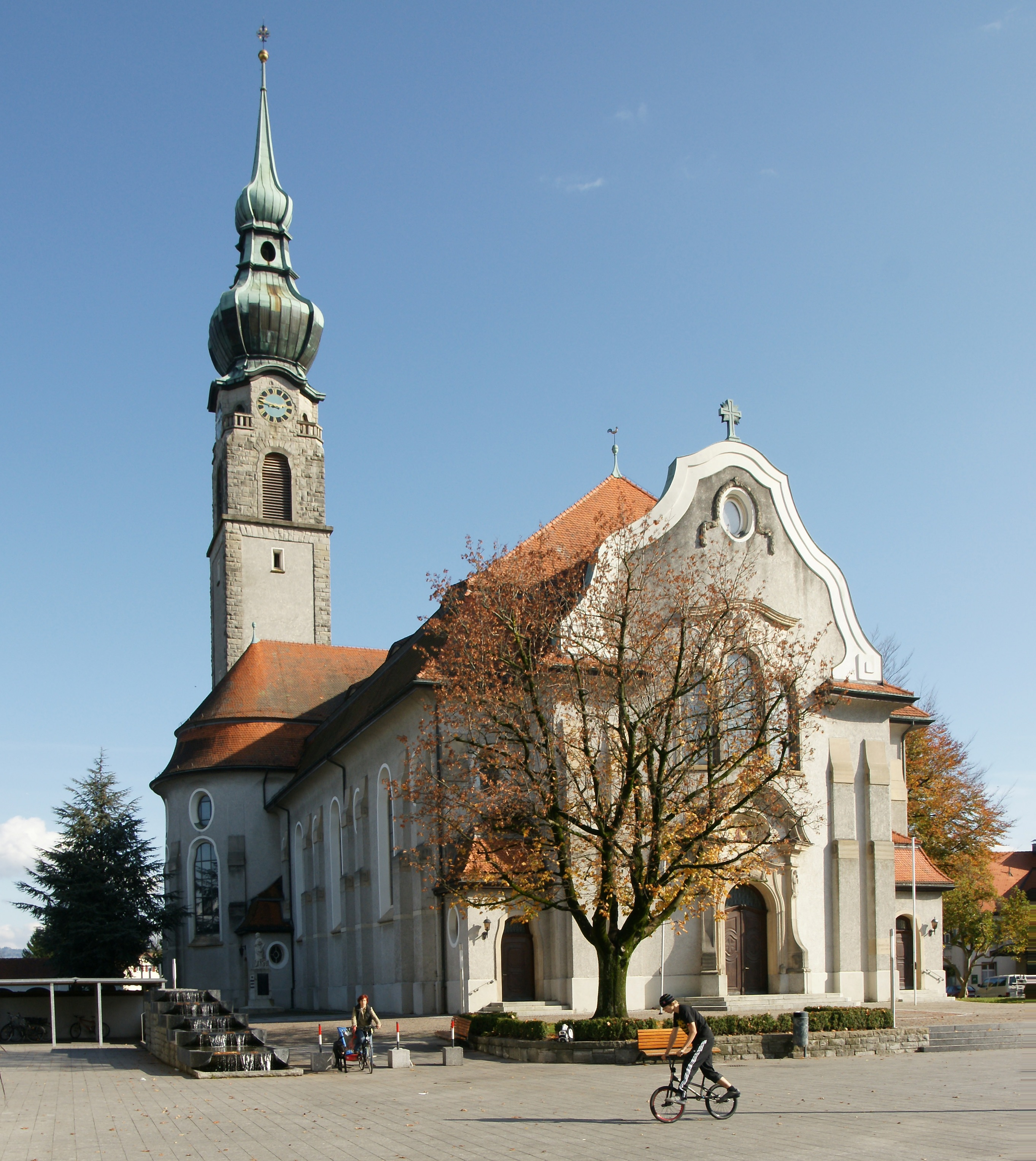 Pfarrkirche hl. Johannes dem Täufer., in Höchst (Vorarlberg). Im Norden Friedhof mit Arkaden. Mächtige neobarocke Kirche mit Querschiff, geschwungener Giebelfassade und schlankem Nord-Turm mit Zwiebelhaube. Heutiger Bau 1908-1910 nach Plan von Albert Rimli durch Baumeister Cornel Rhomberg.